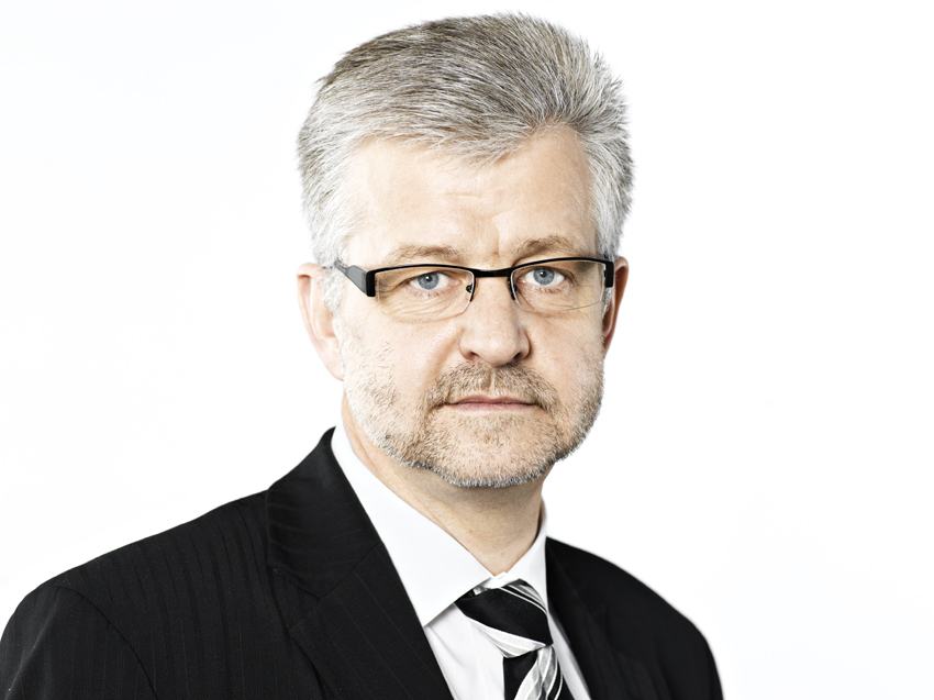 Foto af Allan Søgaard Larsen.